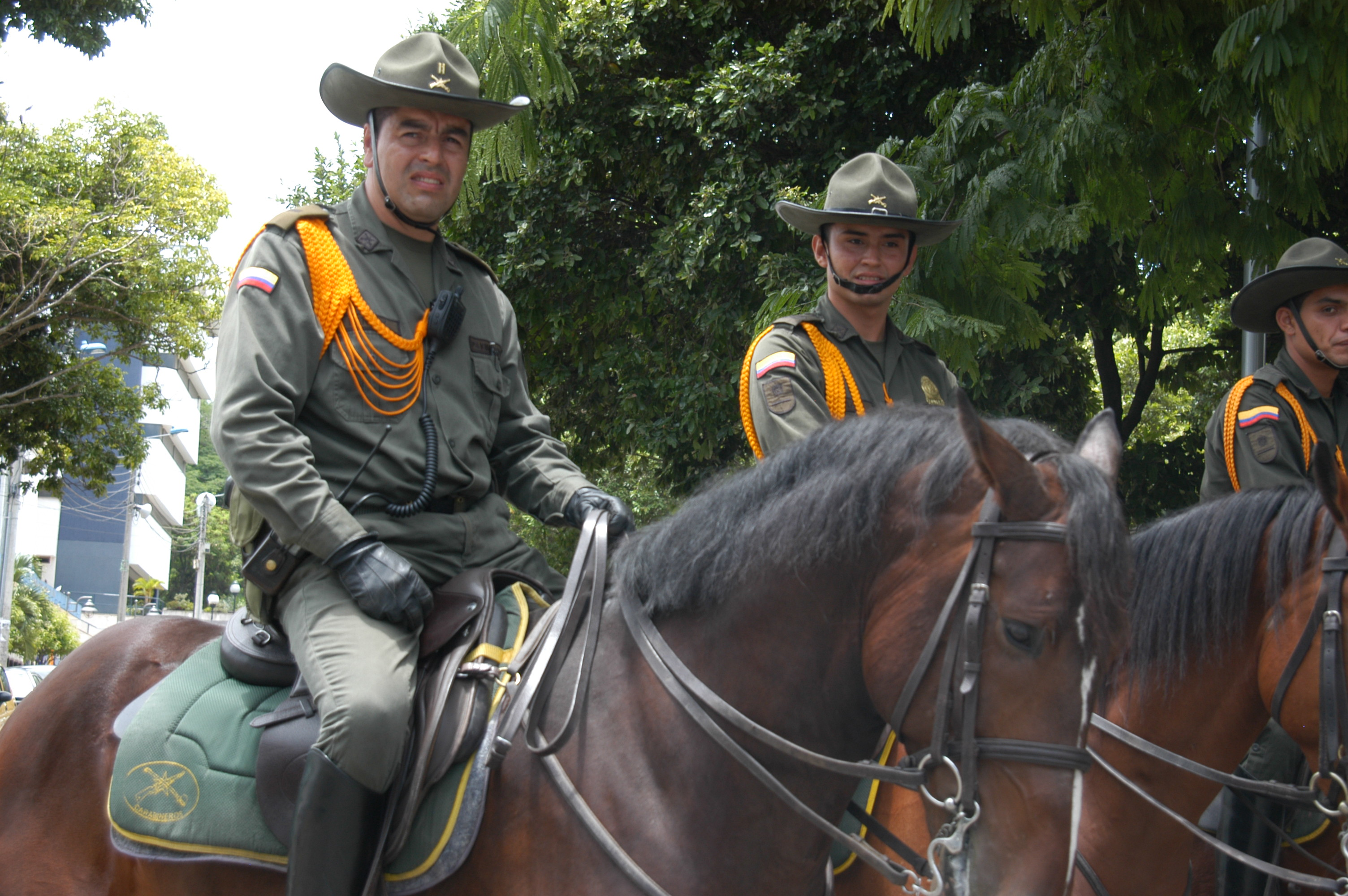 Carabineros de la Policía Nacional de Colombia